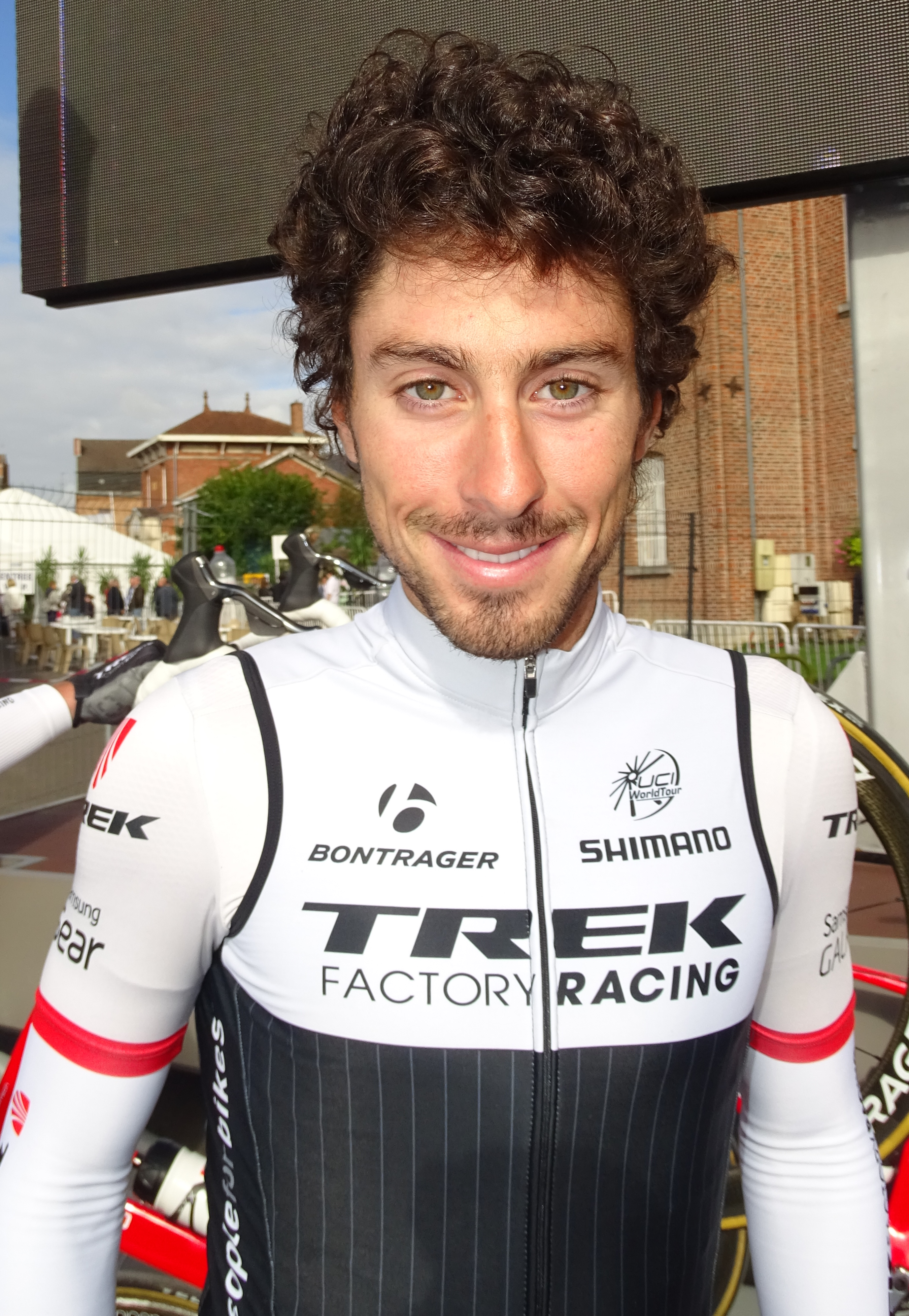 Reportage réalisé le dimanche 6 septembre à l'occasion du départ et de l'arrivée du Grand Prix de Fourmies 2015 à Fourmies, Nord-Pas-de-Calais, France.